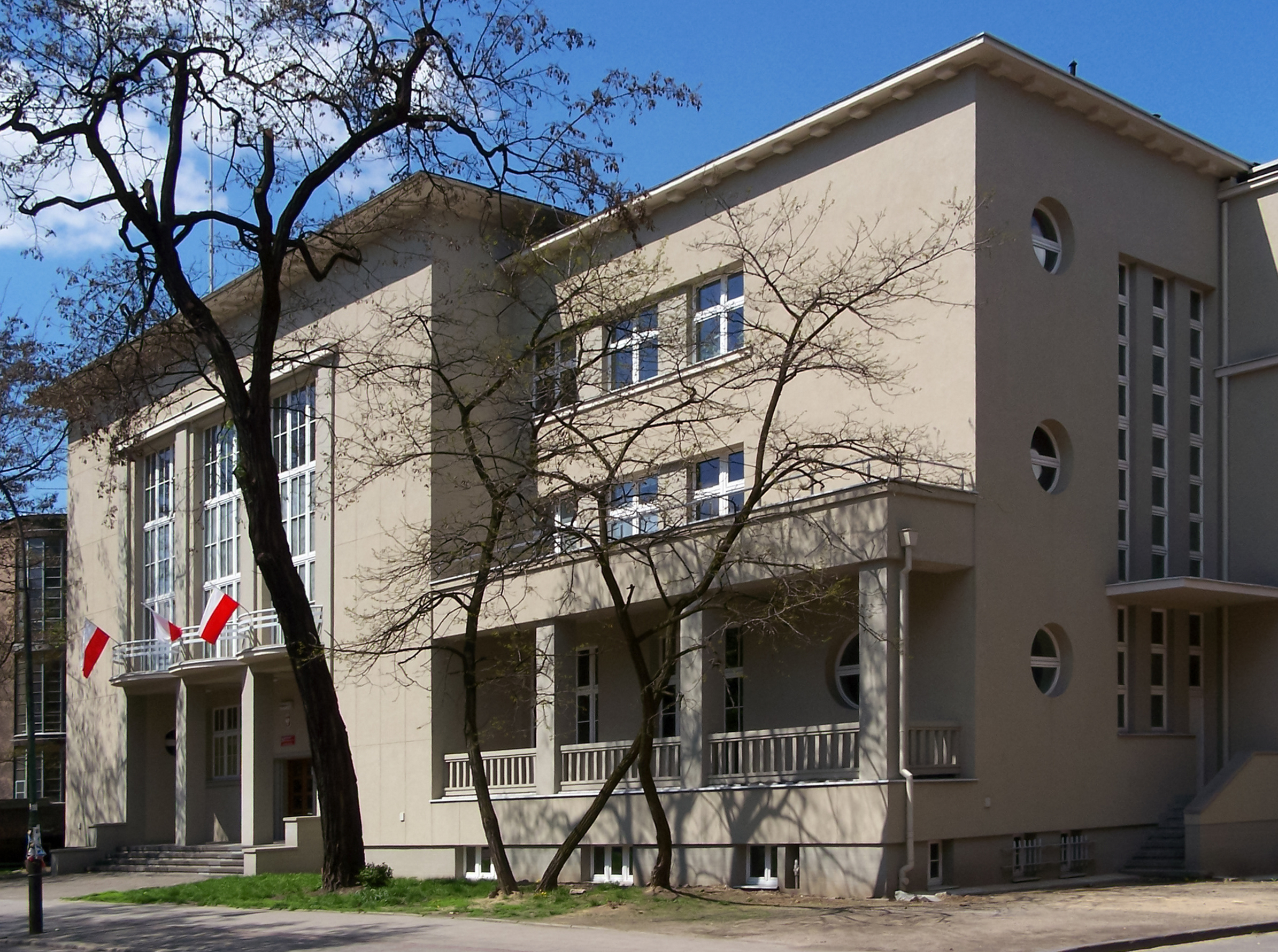 Budynek Akademii Sztuk Pięknych przy ulicy Raciborskiej w Katowicach. W okresie międzywojennym mieściło się w nim kasyno oficerskie.